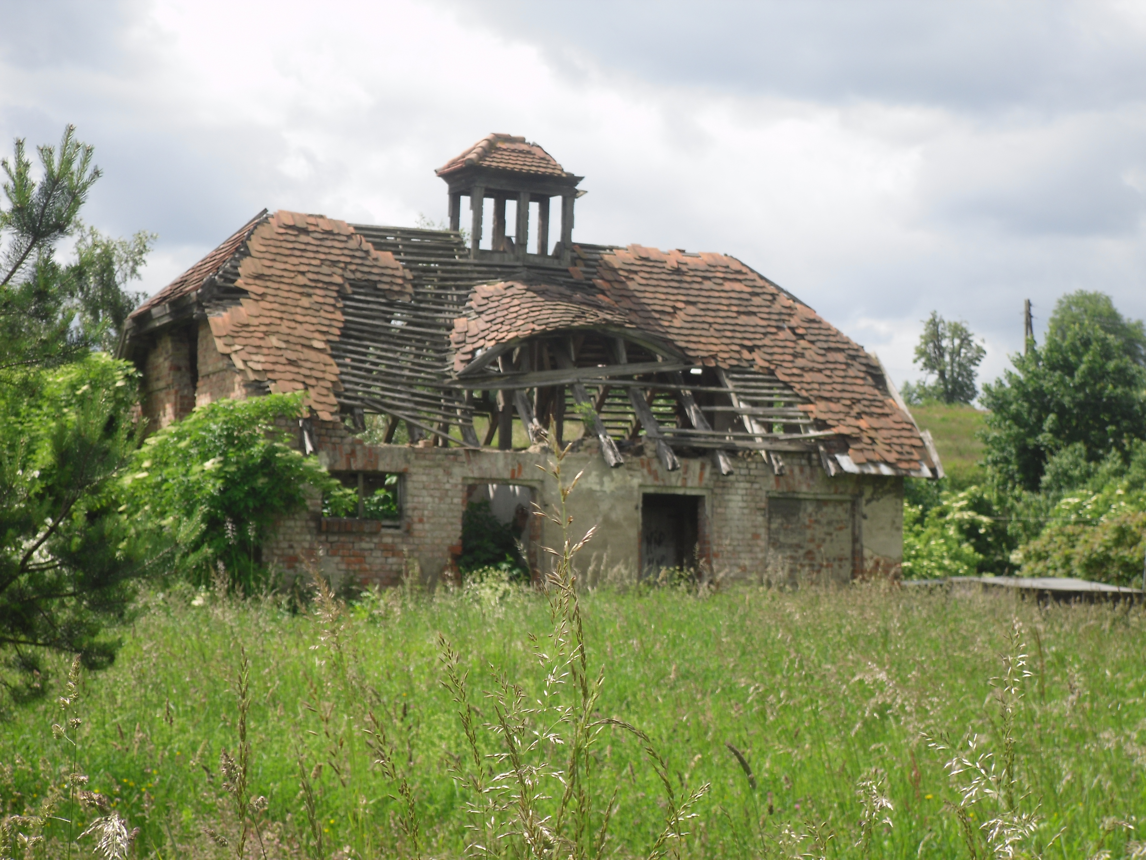 Toalety na stacji w Gdańsku Kiełpinku.